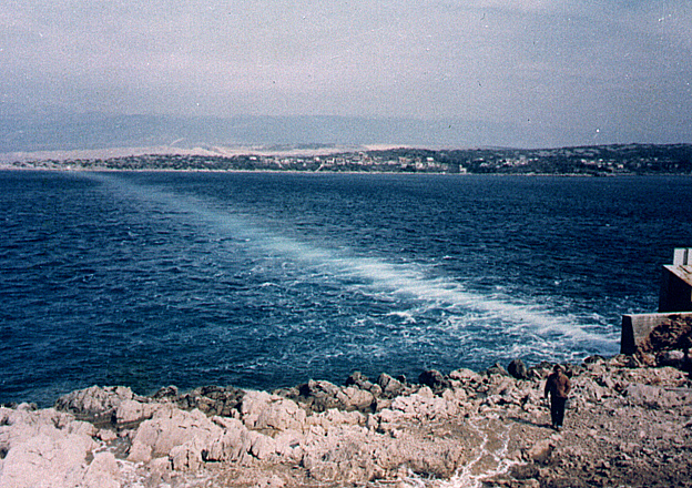 Sperrung einer Industriebucht in Rijeka, Kroatien